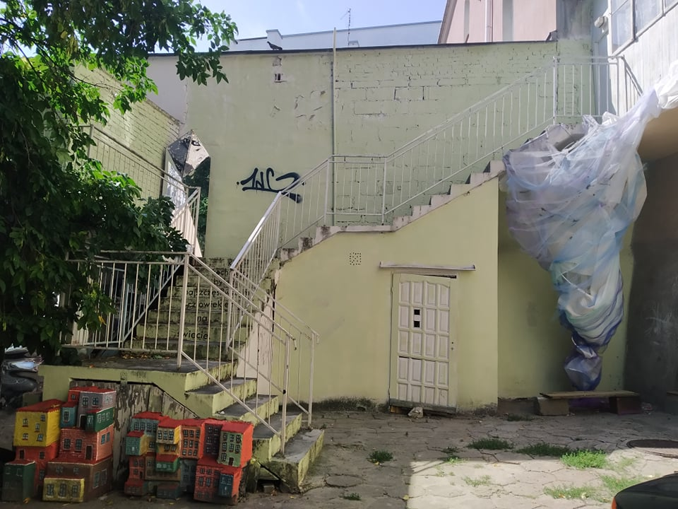 Instalacja artystyczna nawiązująca do bajki "Czarnoksiężnik z Krainy Oz" na Podwórku Domu Słów.